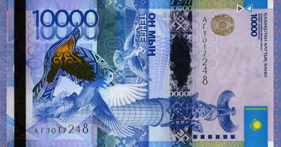 10000 тенге 2012 года